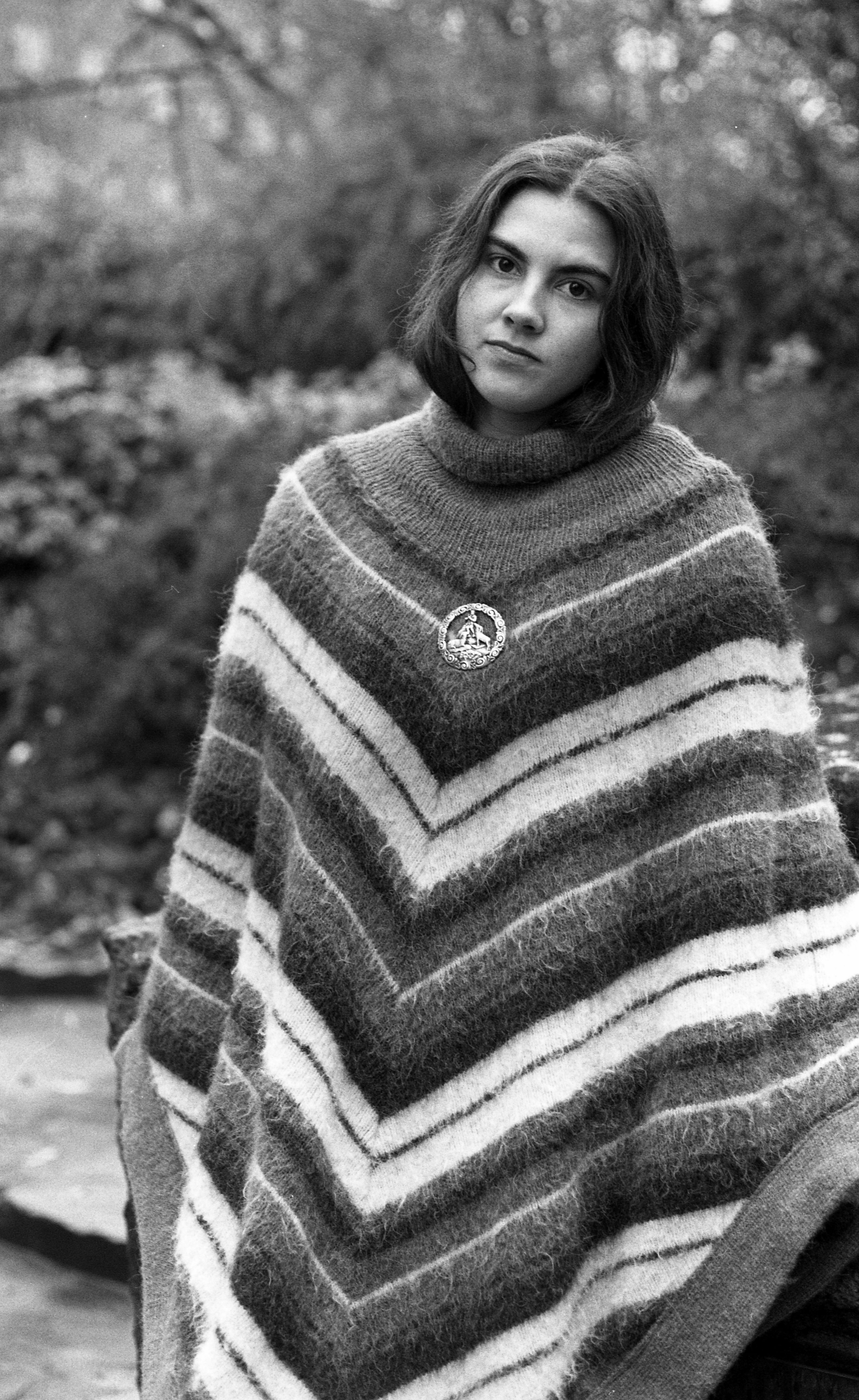 "Fersk fjes i TV", 1976. Foto: Per Olav Berg. Arkivref.: PA-0797_U_8732_001_018